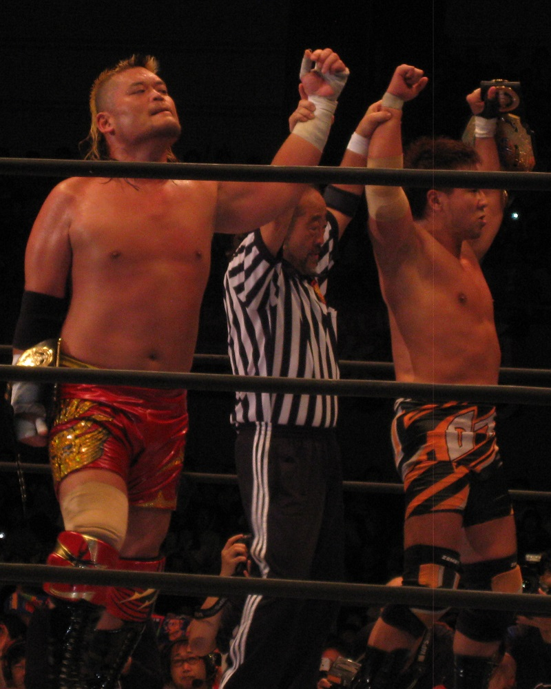 2014年6月21日 大阪府立体育会館 「DOMINION6.21」 天山広吉&小島聡 NWA世界タッグ王者組